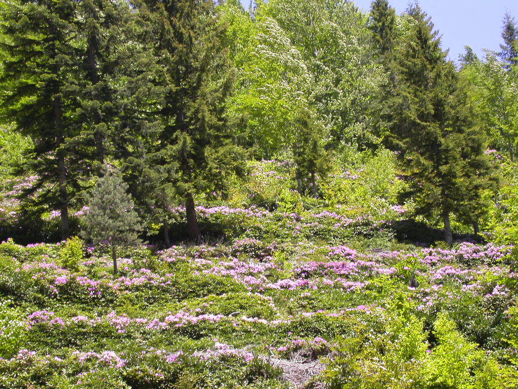 Örümcek Ormanları